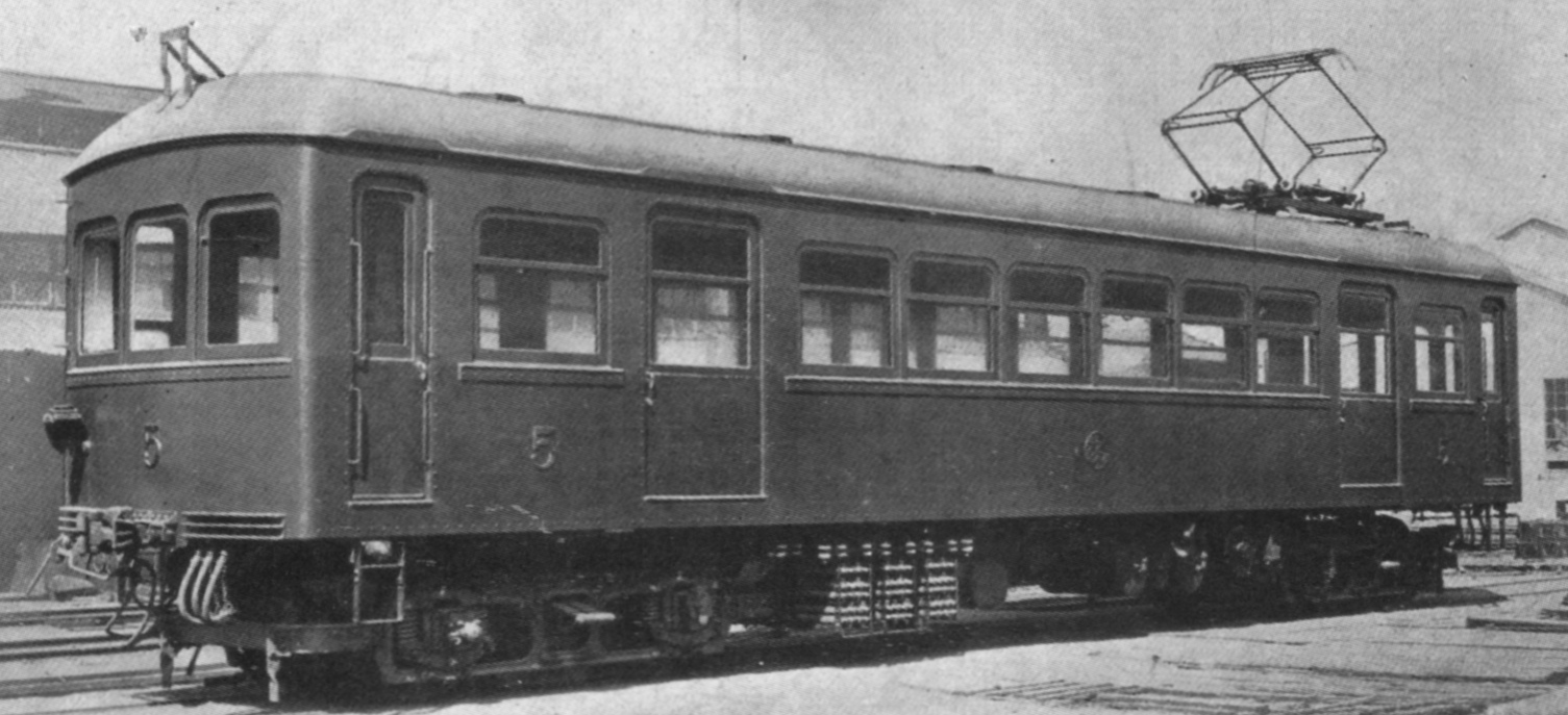 信貴山電鉄デ5形 急勾配線用としてカーボランダムブレーキを採用